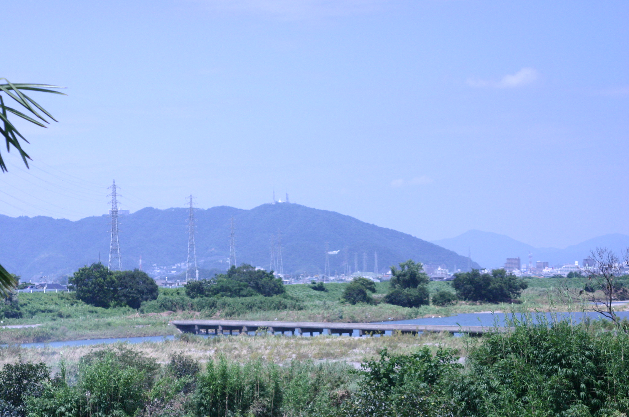 勝浦川小松島付近